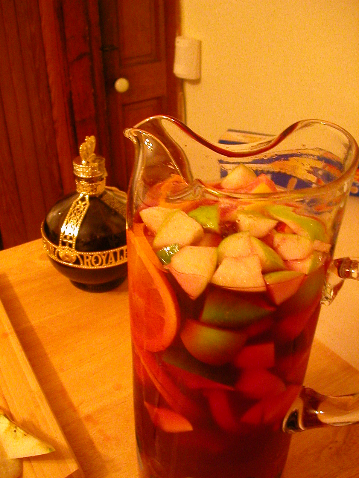 home made Sangria